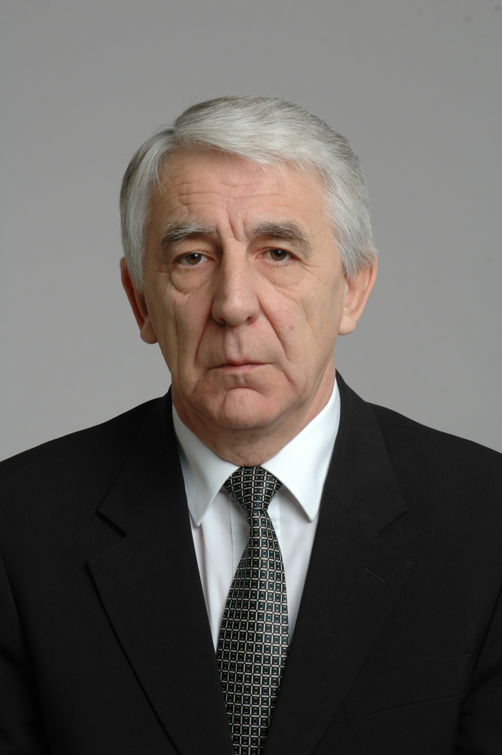 Foto: Saeima